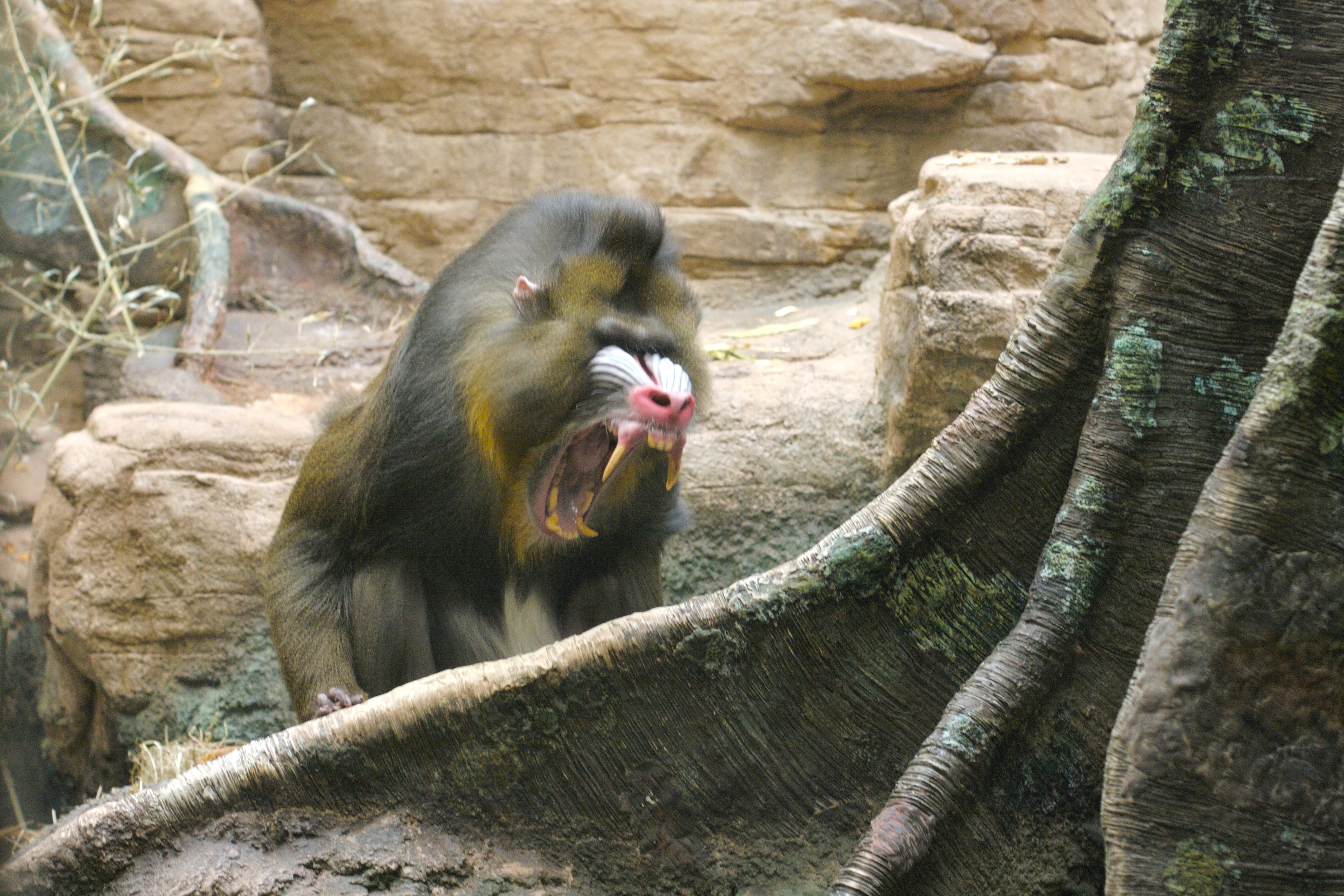 Male Mandrill in Franklin Park Zoo, Boston